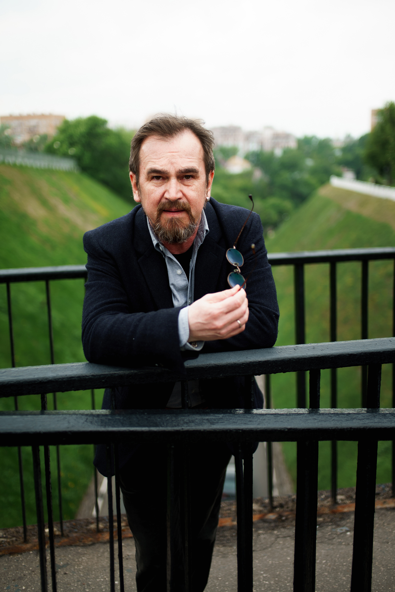 портрет